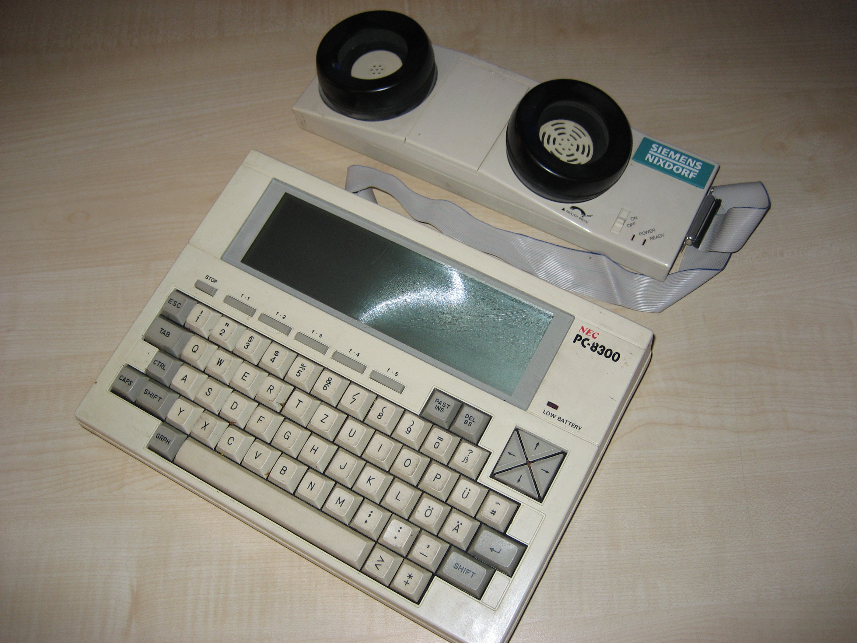 NEC "Laptop" PC-8300 mit Epson Akustikkoppler CX-21